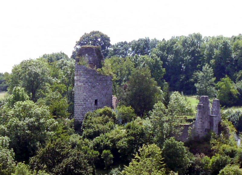 Burg Altmannstein Nordwest-Ansicht